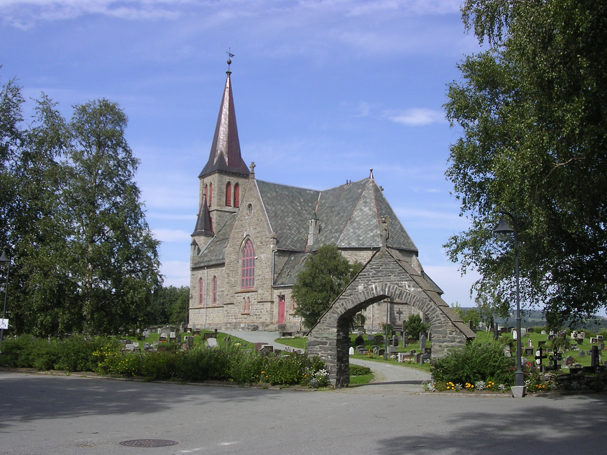 Melhus kirke i Melhus kommune, Sør-Trøndelag